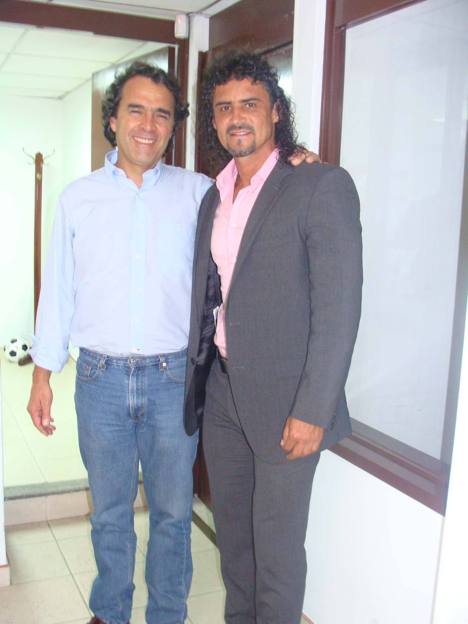 leonel alvarez